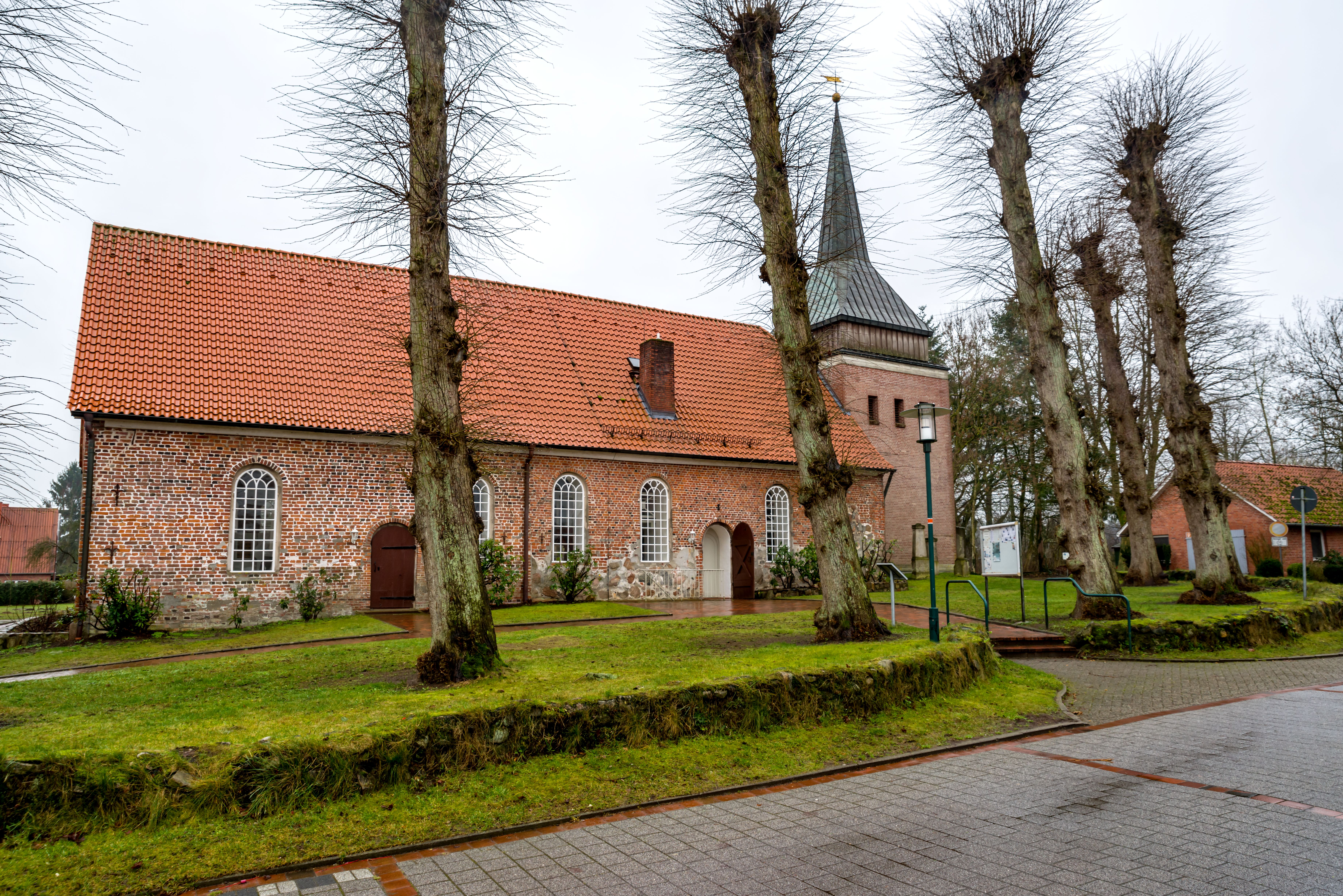 St. Marienkirche von 1384 in Hechthausen, Niedersachsen, Deutschland